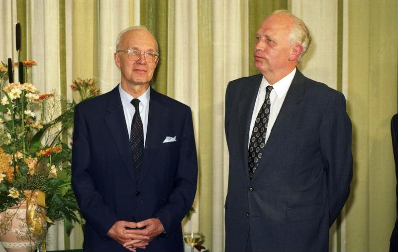 Bonn, 31.7.1991 Der Parlamentarische Staatssekretär beim Bundesminister der Finanzen, Manfred Carstens, gab anläßlich der Ernennung von Prof. Dr. Helmut Schlesinger zum Präsidenten der Deutschen Bundesbank und Dr. Hans Tietmeyer zum Vizepräsidenten der Deutschen Bundesbank einen Empfang im Bundesministerium der Finanzen.